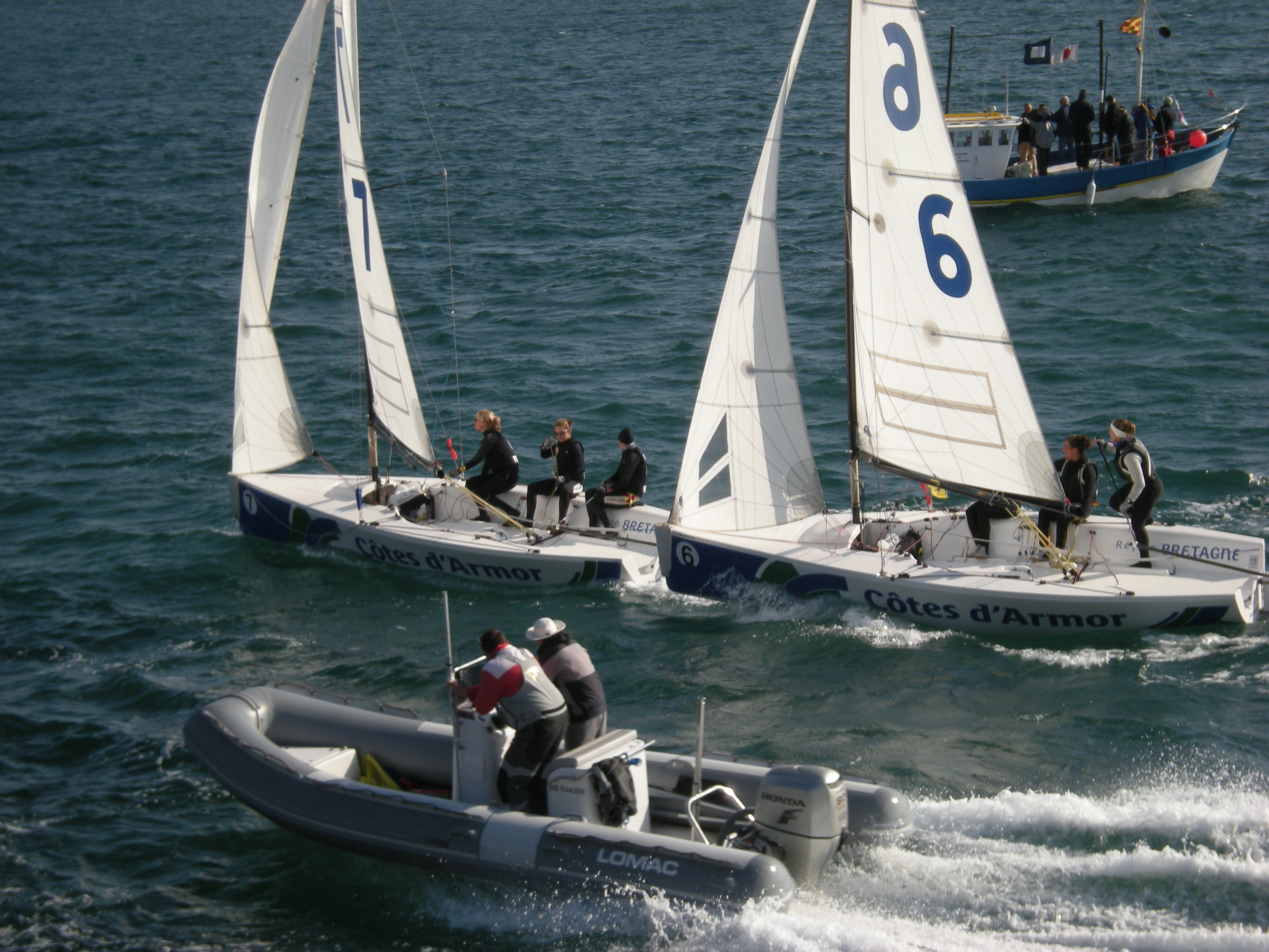 Avant le départ d'une manche de la petite finale St Quay 2011. Anne-Claire Le Berre (7) contre Silvia Roca Mata (6)